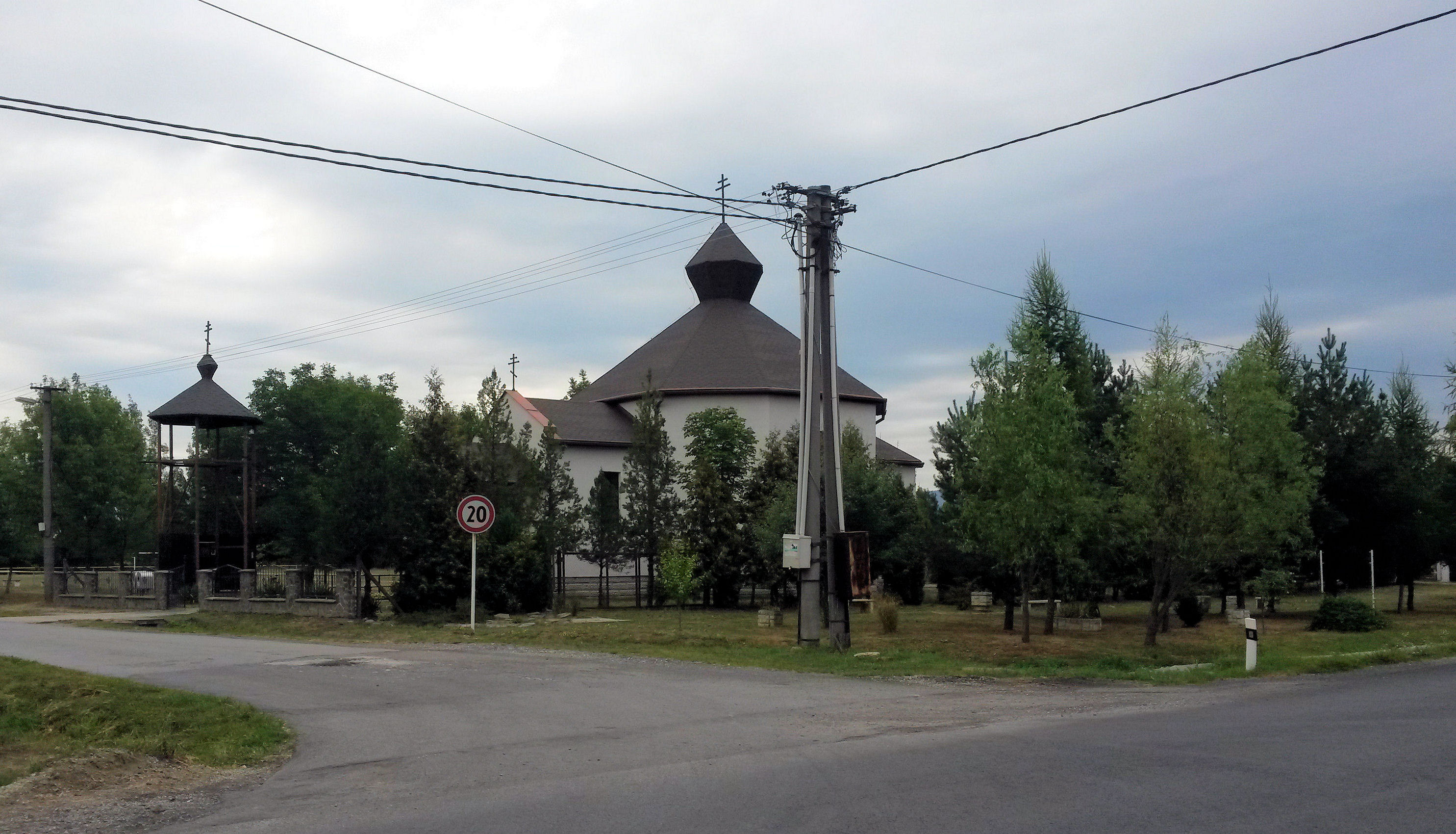 Nižná Rybnica, kostol